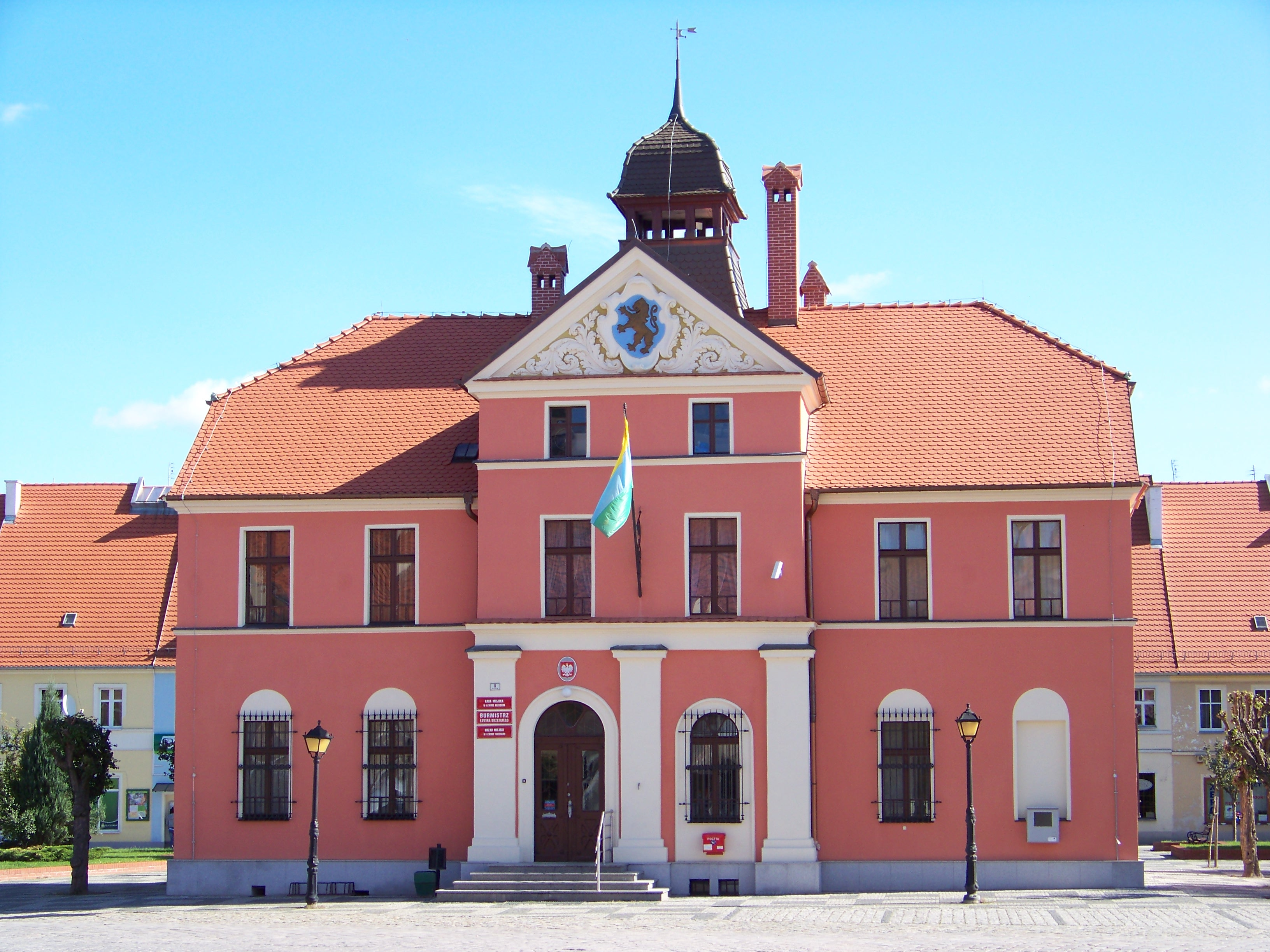 ratusz Lewin Brzeski, Rynek 1, Lewin Brzeski 01.1966.